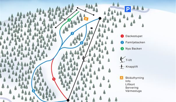 Pistkarta